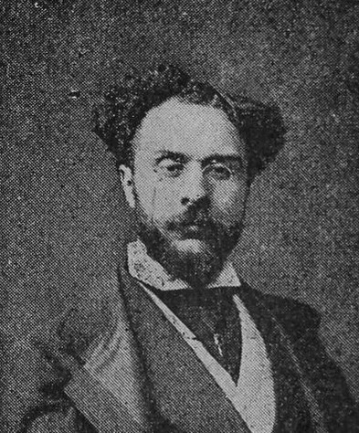 "Cunéo d'Ornano (Gustave)".